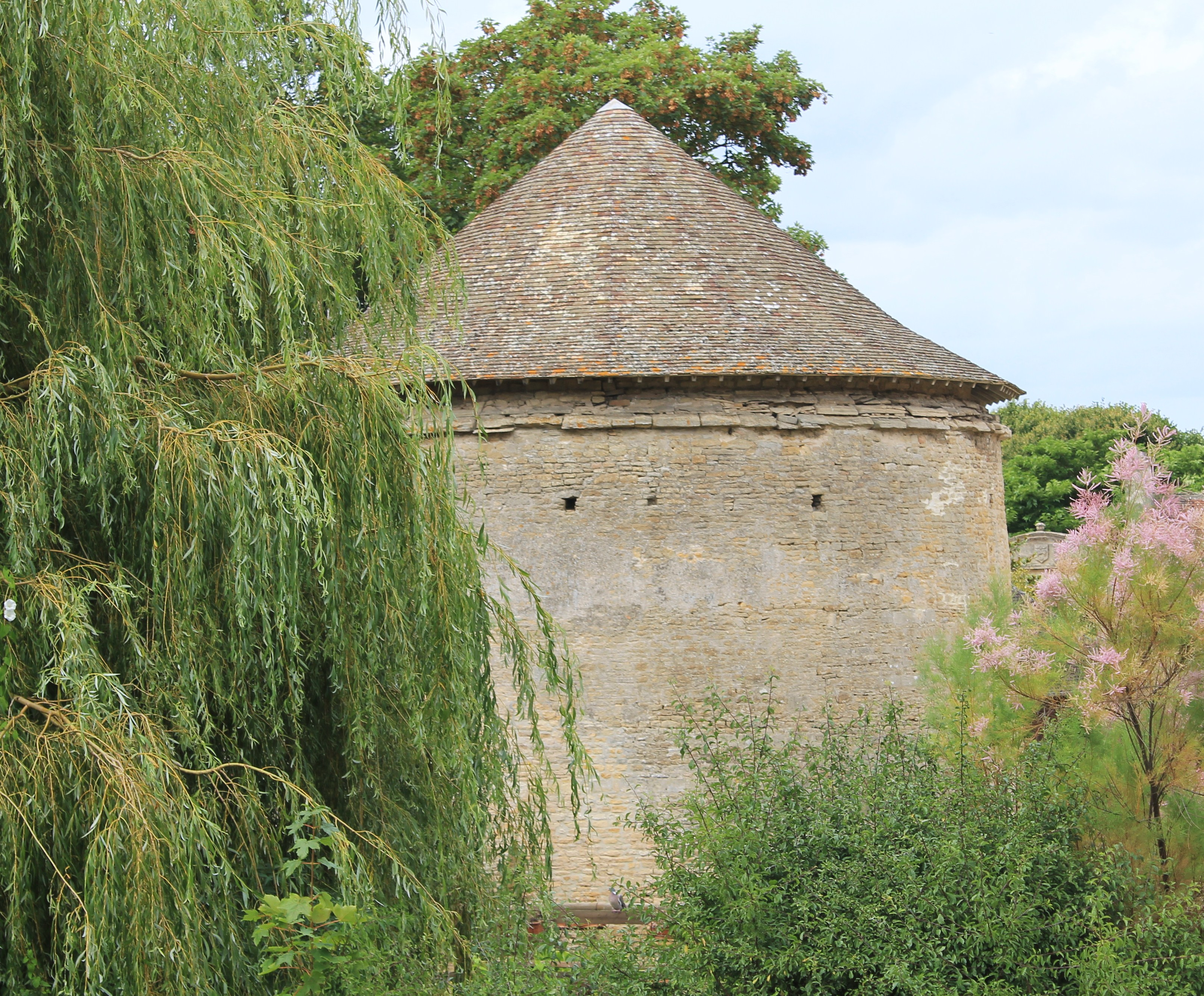 Colombier de la ferme du manoir de la Luzerne à Bernières-sur-Mer (Calvados)